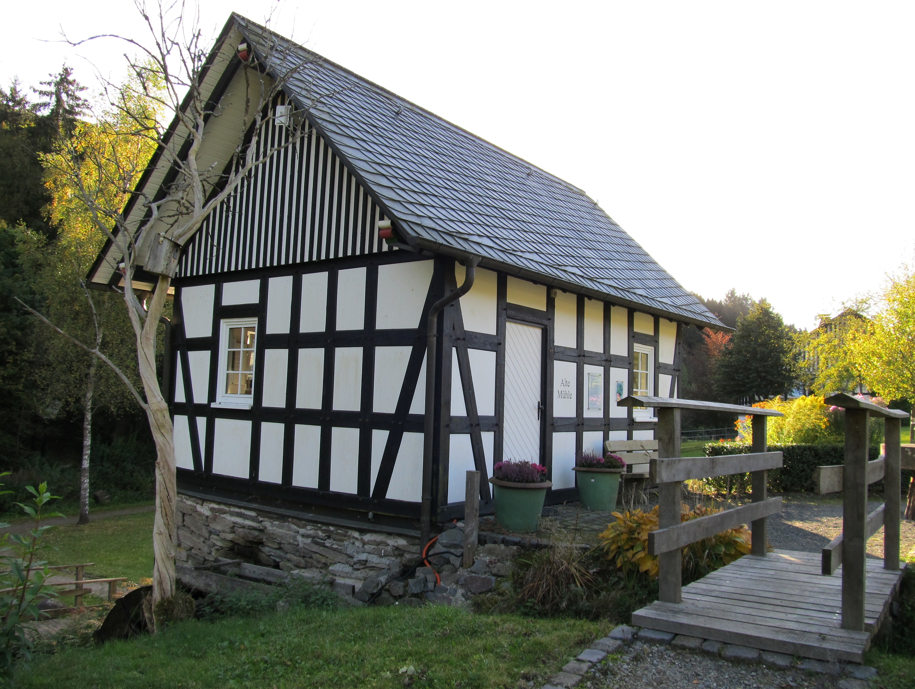 This is a photograph of an architectural monument., no. 204 Ehemalige Mühle Halberstadt in Schmallenberg-Latrop; das Gebäude wurde im Jahr 1739 als Eisenhammer vom Kloster Grafschaft errichtet; seit 2003 befindet sich ein Waldarbeitermuseum in dem Gebäude